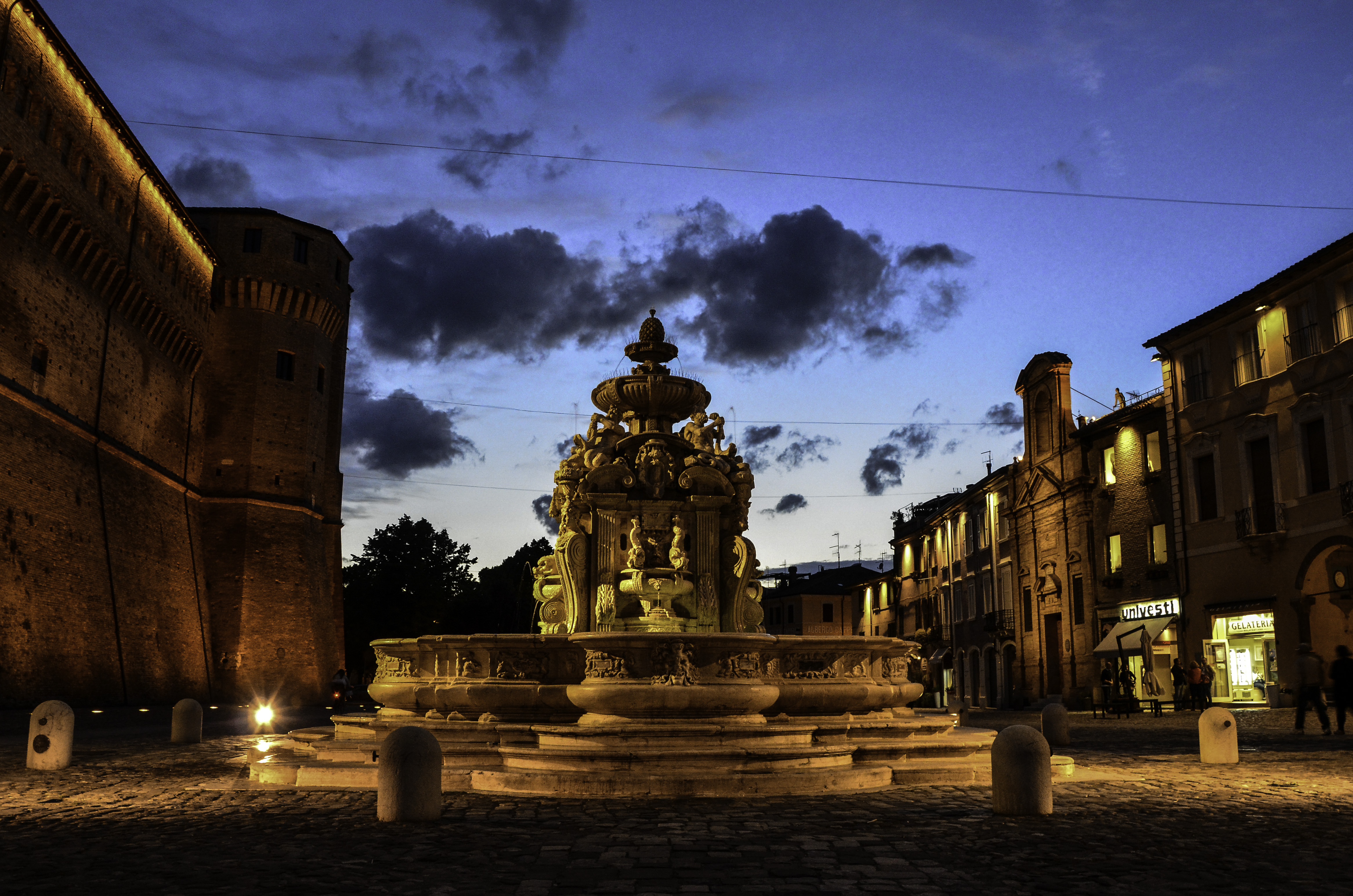 Piazza del Popolo This is a photo of a monument which is part of cultural heritage of Italy.